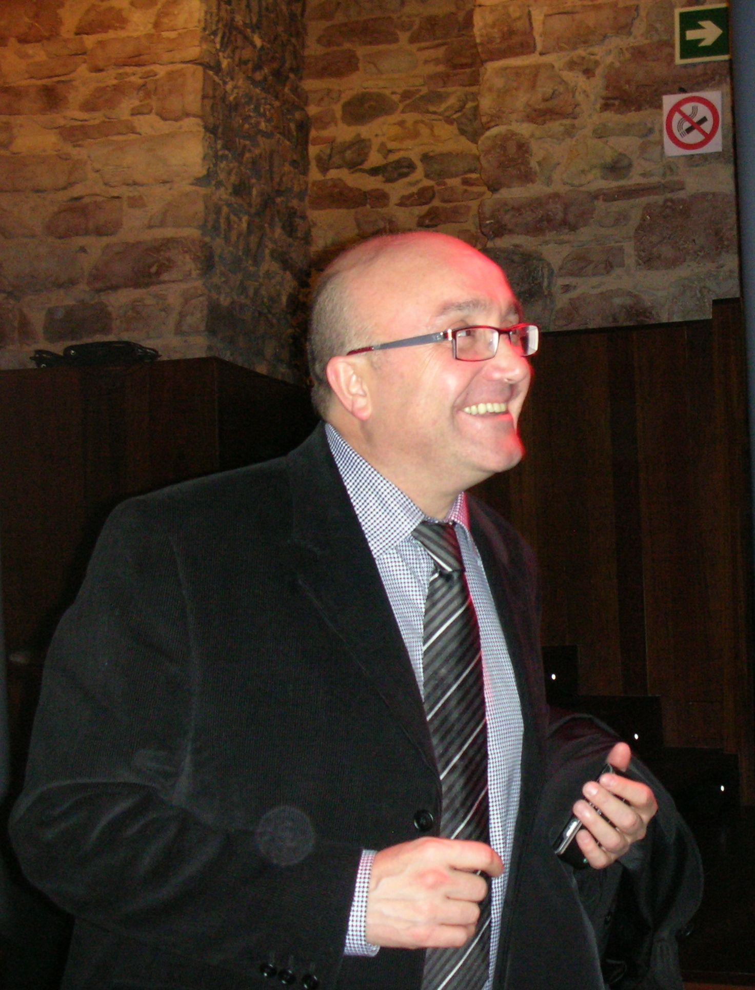 Patxi Baztarrika, HPSko zuzendaria